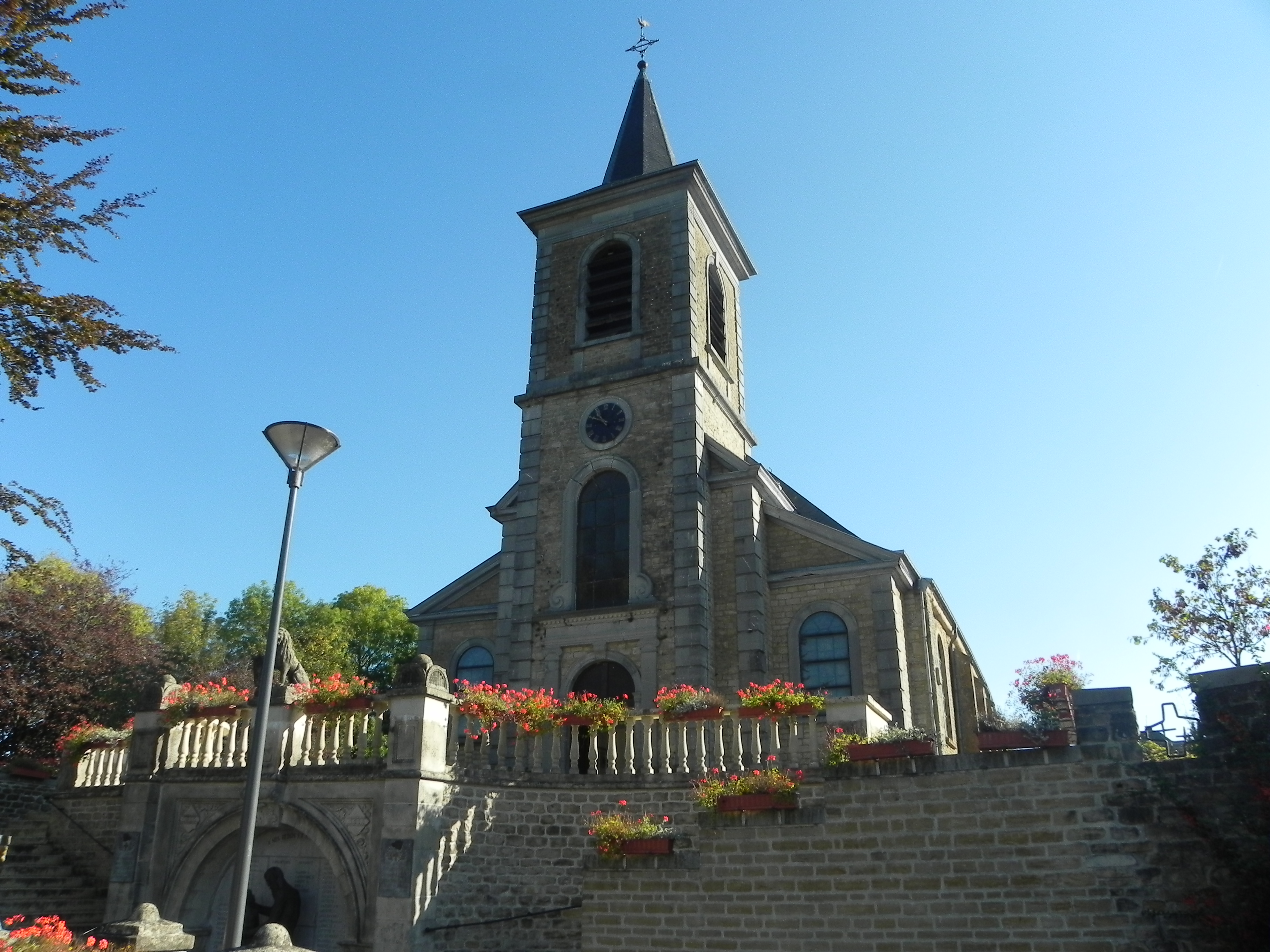 Eglise Notre-Dame de l'Assomption, Tintigny